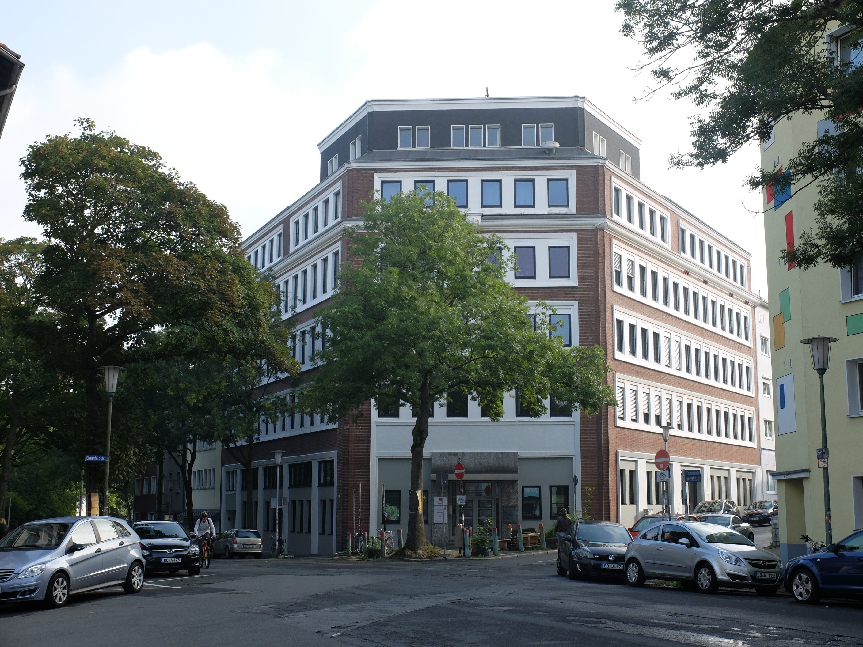 Bürohaus Bochum, seit 1983 Fritz-Husemann-Haus, Alte Hattinger Straße 19 in Bochum, Nordrhein-Westfalen; erbaut 1925; Sitz der IG Bergbau und Energie